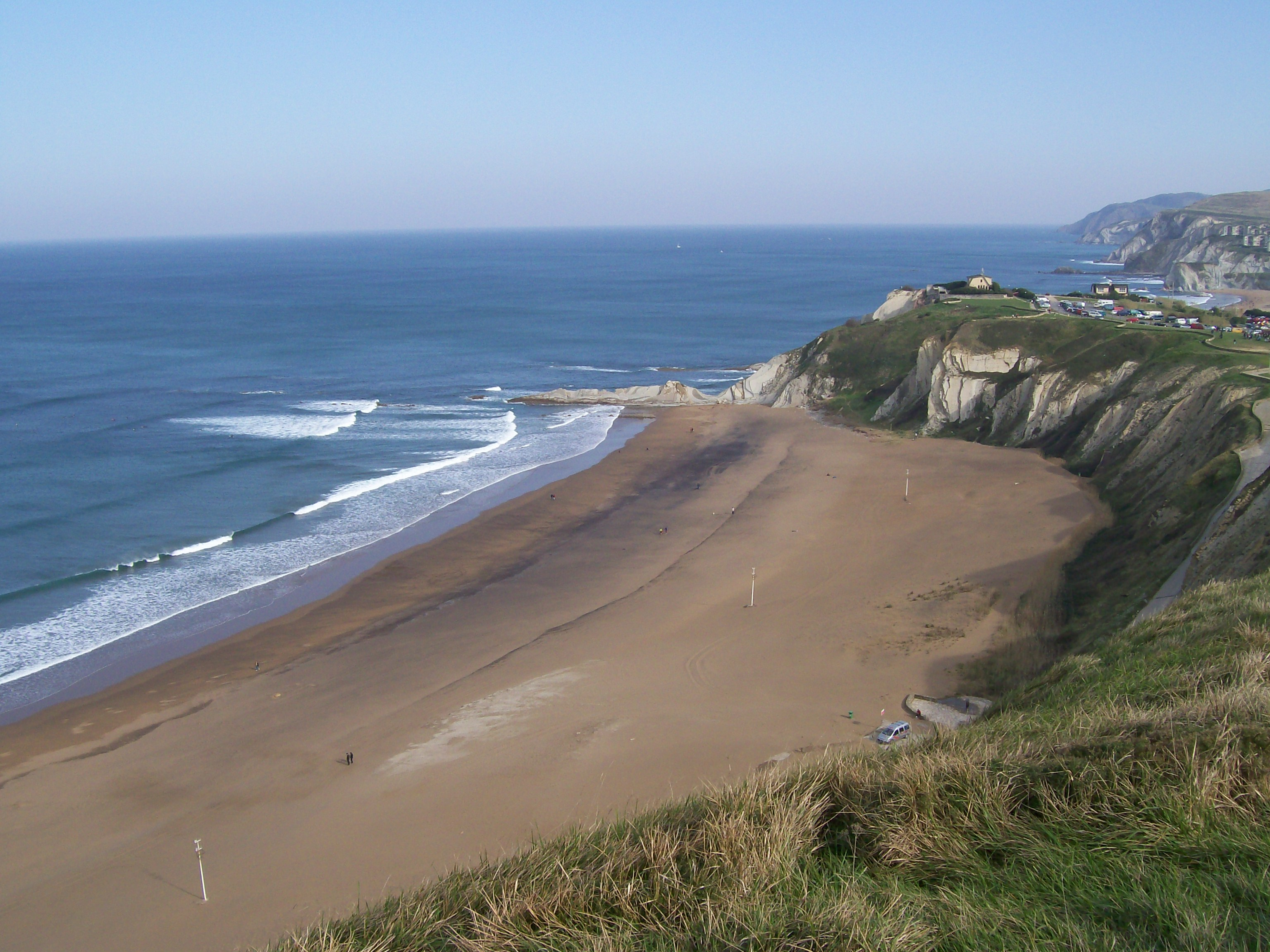 Barinatxe hondartzaren kokapena